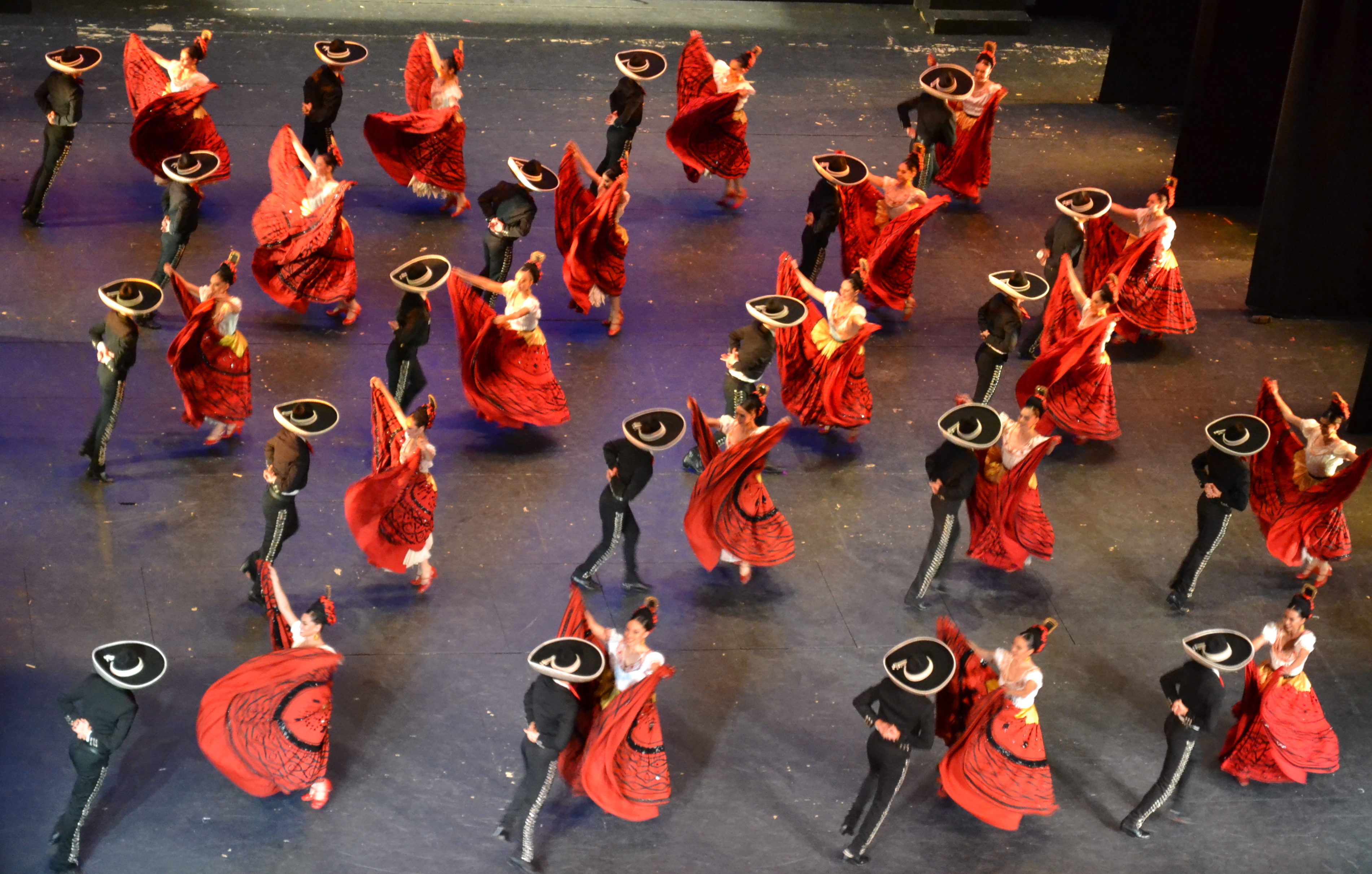 Es una foto que representa totalmente lo que puedes observar en el evento, bailes típicos mexicanos. la foto la tome yo el 4 de octubre de 2016 en el palacio de bellas artes, lugar donde se presenta el ballet folklórico de México.